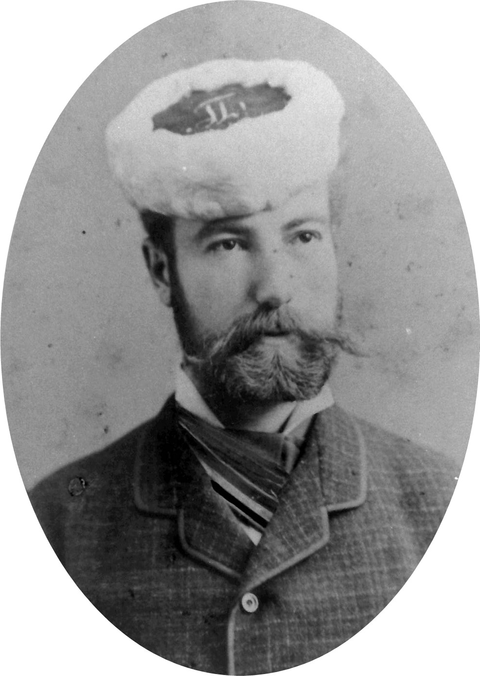 Porträtfotografie des spätereen Pathologen Albert Dubler